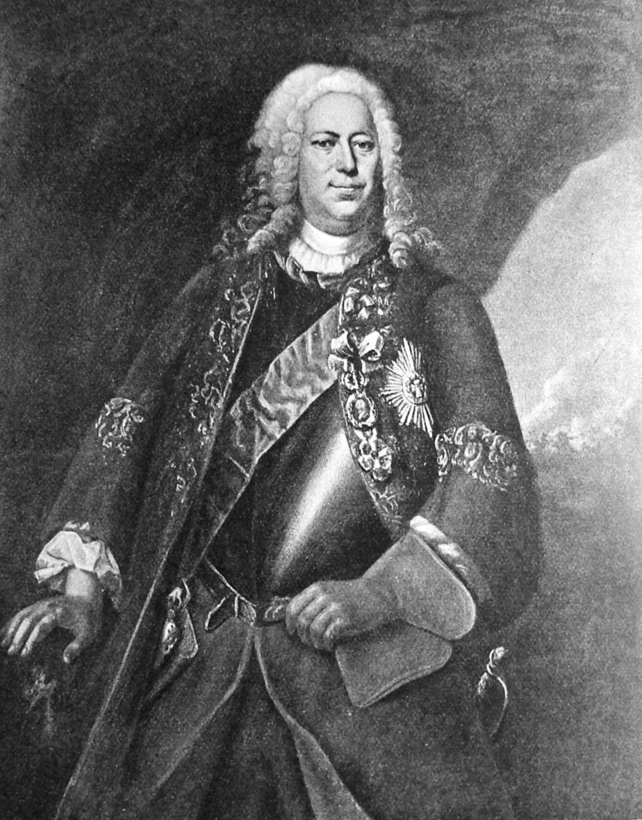 Poul Vendelbo Løvenørn 1686-1740 var en dansk officer og politiker.